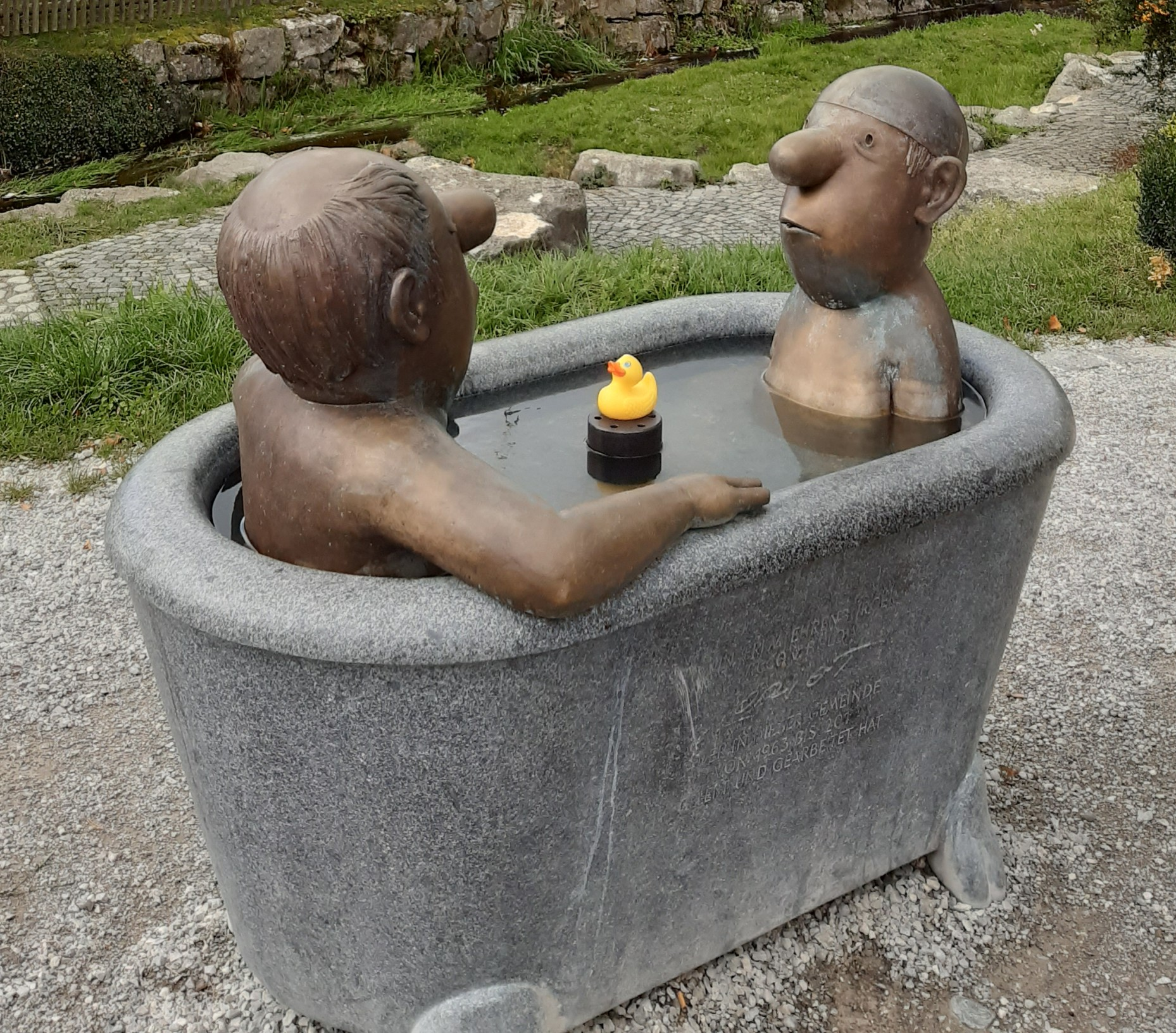 Dorfplatz Münsing, Loriot-Denkmal "Herren im Bad", 2017; sculpture by Max Wagner